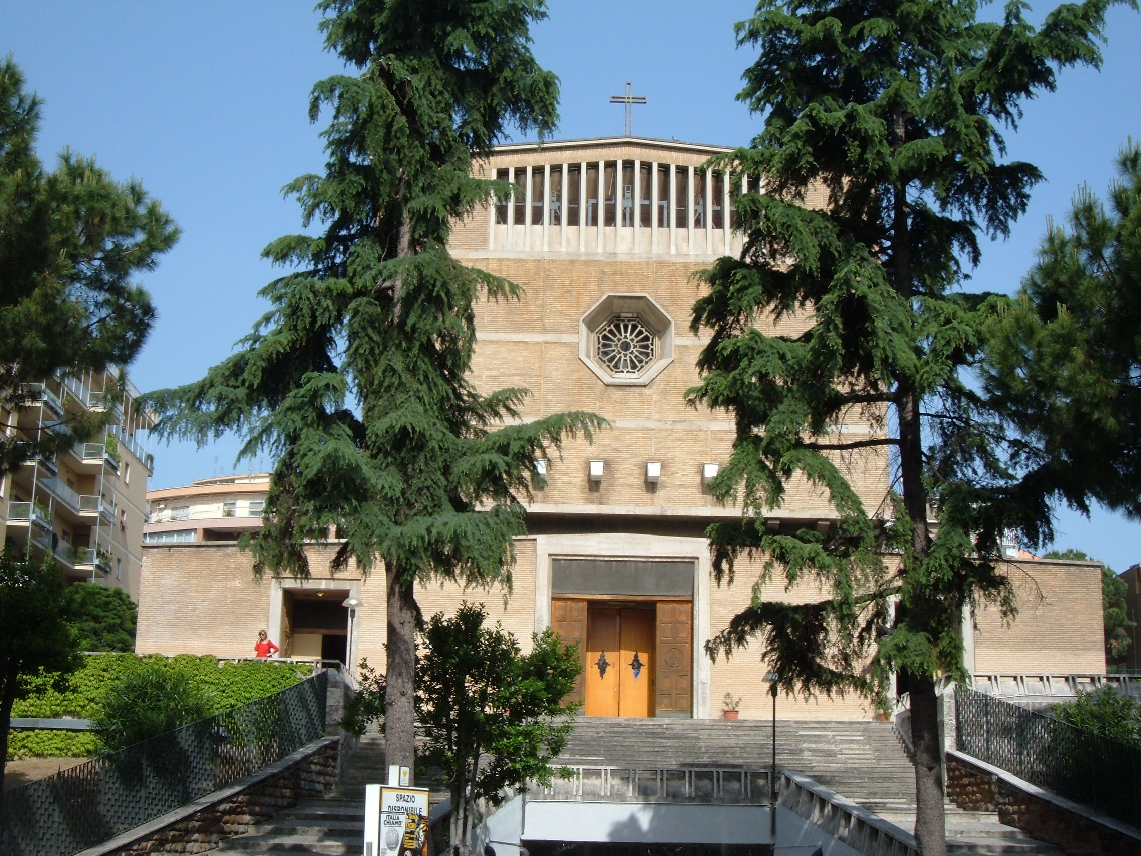 San Pio X (Rome)